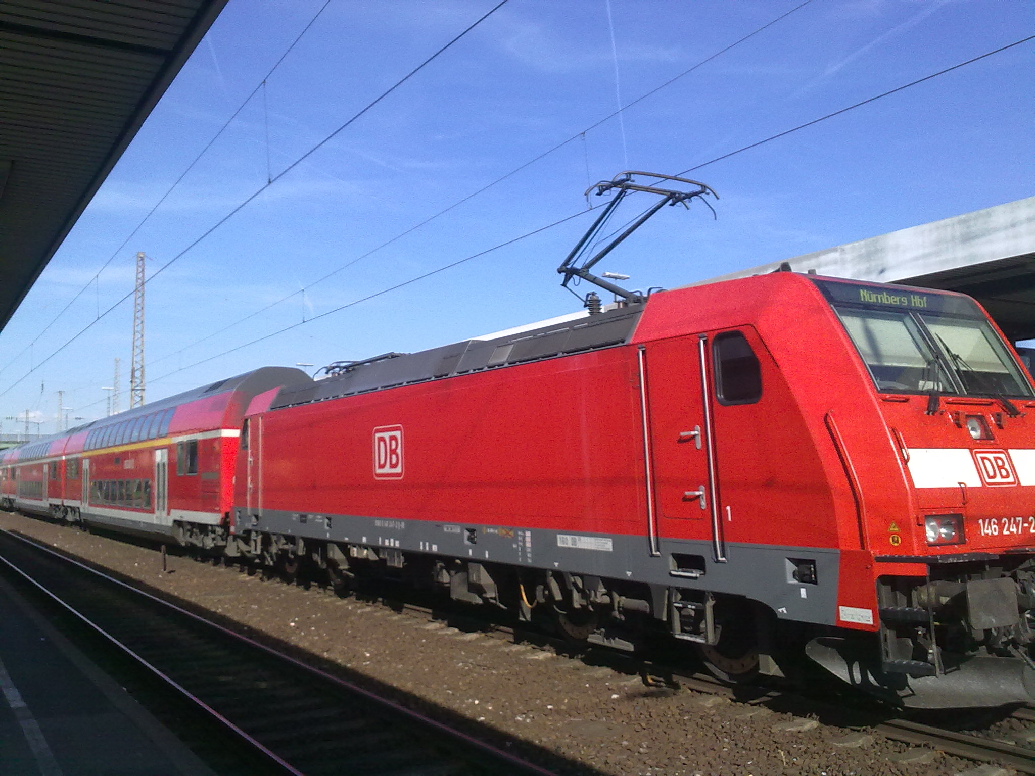 Schweinfurt, Hbf